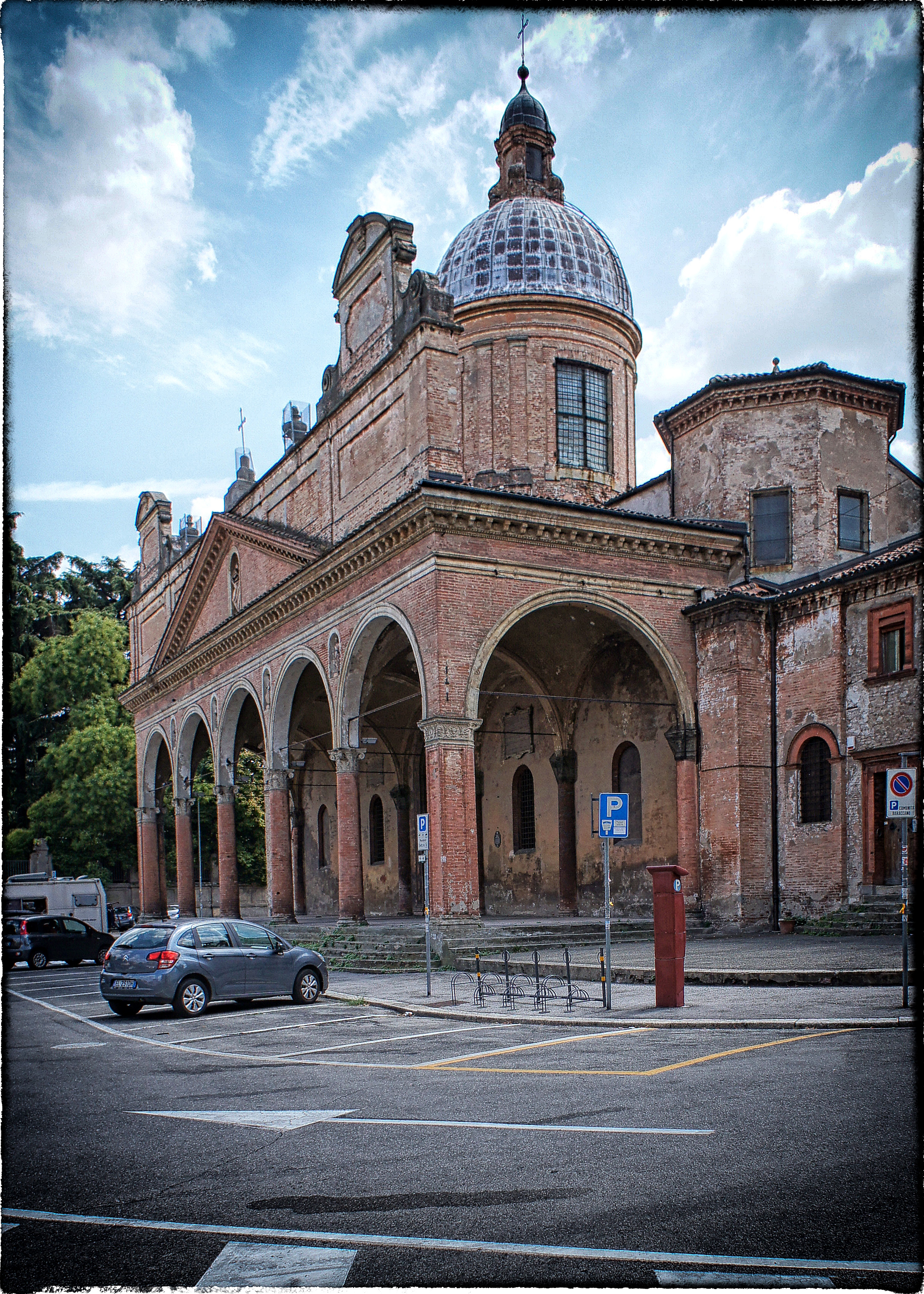 Baraccano This is a photo of a monument which is part of cultural heritage of Italy.